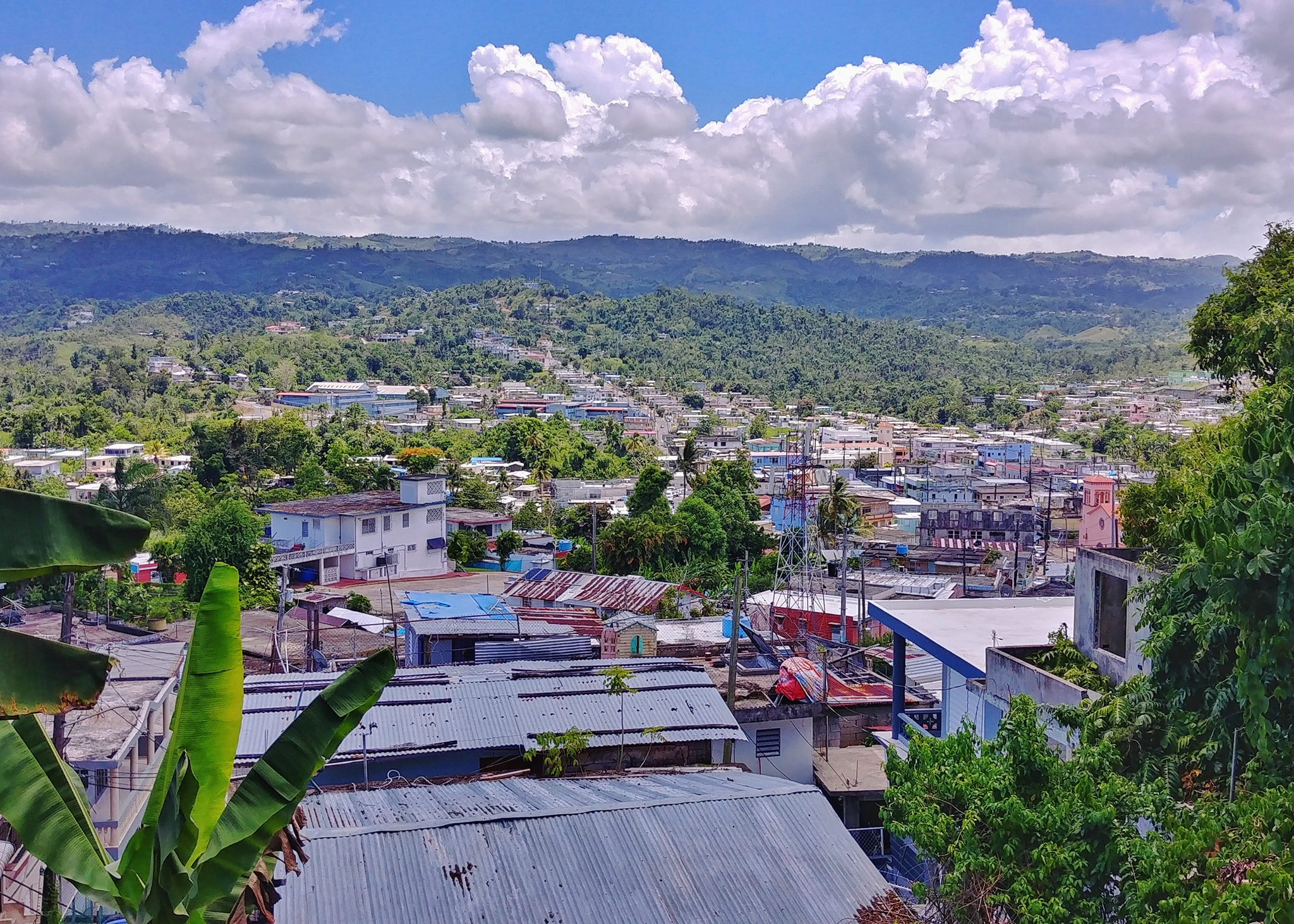 Corozal barrio-pueblo, Corozal, Puerto Rico (2019)